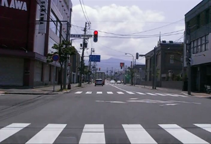 R233（深川4条）旧深川バスターミナル